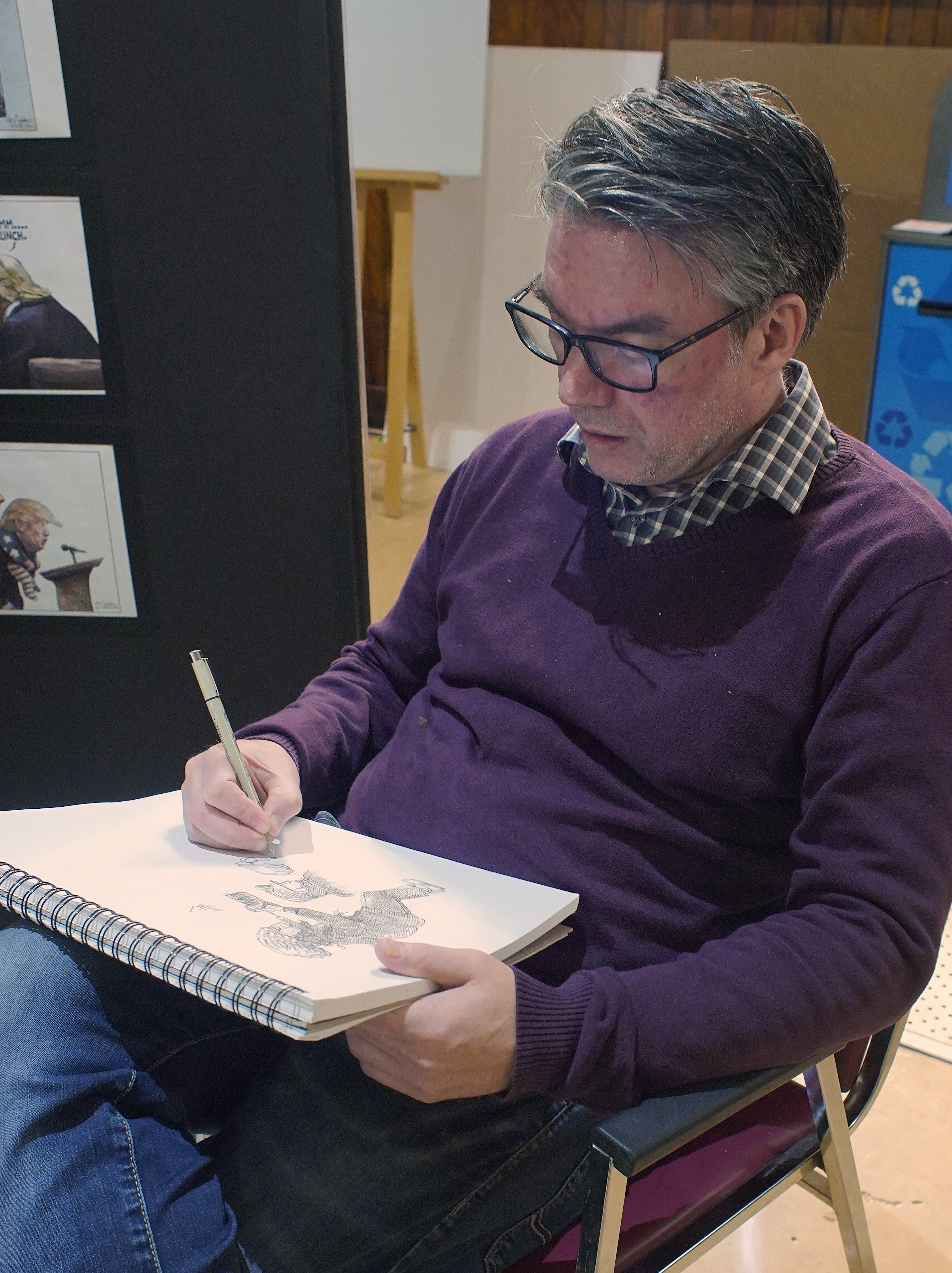 Michael de Adder, caricaturiste éditorial canadien, participant à l'événement « 1001 visages de la caricature », 2019.